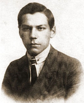 Władysław Sebyła